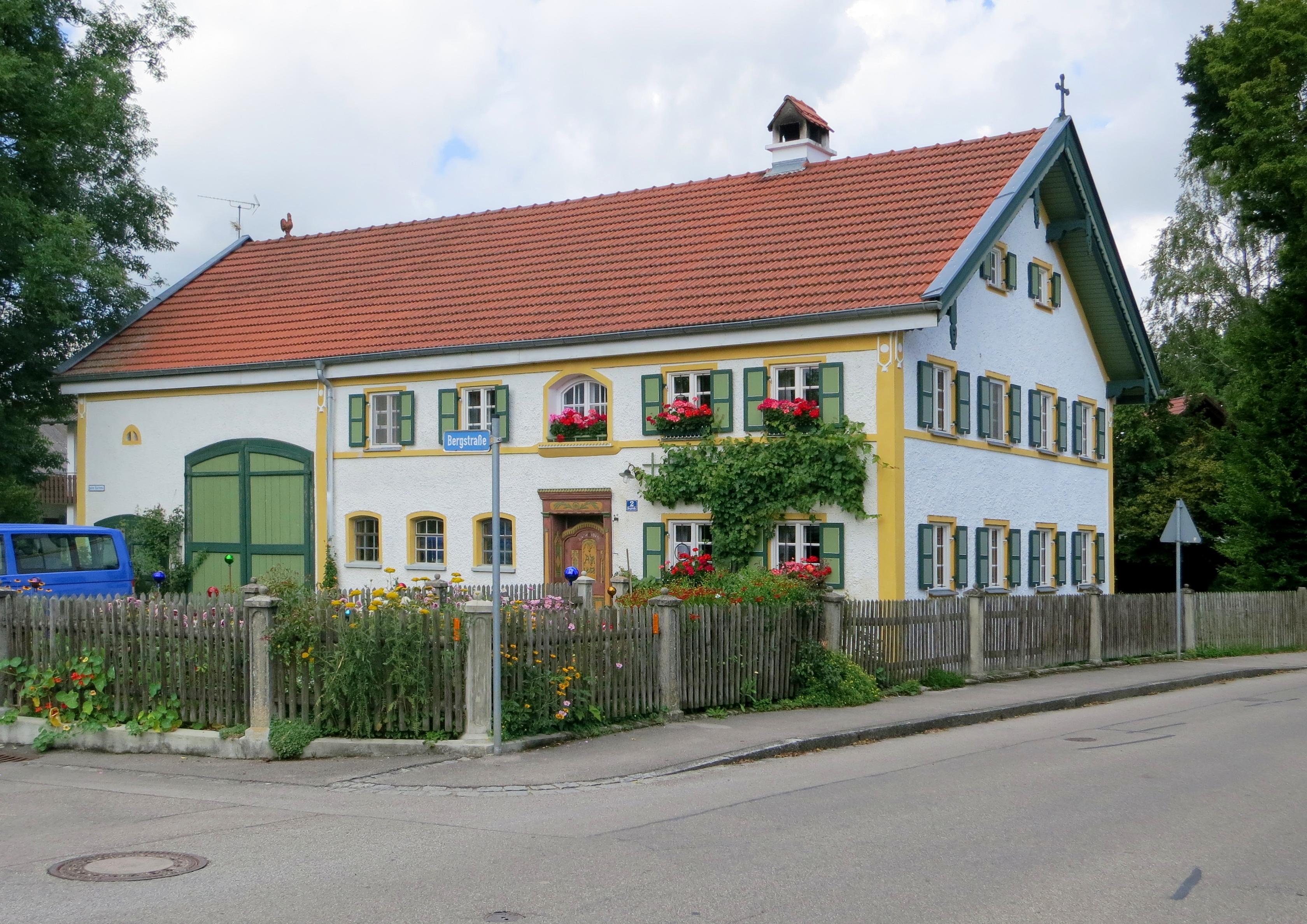 Ehemaliges Bauernhaus in Jesenwang - Totalansicht